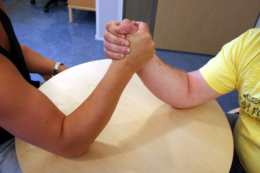 ng